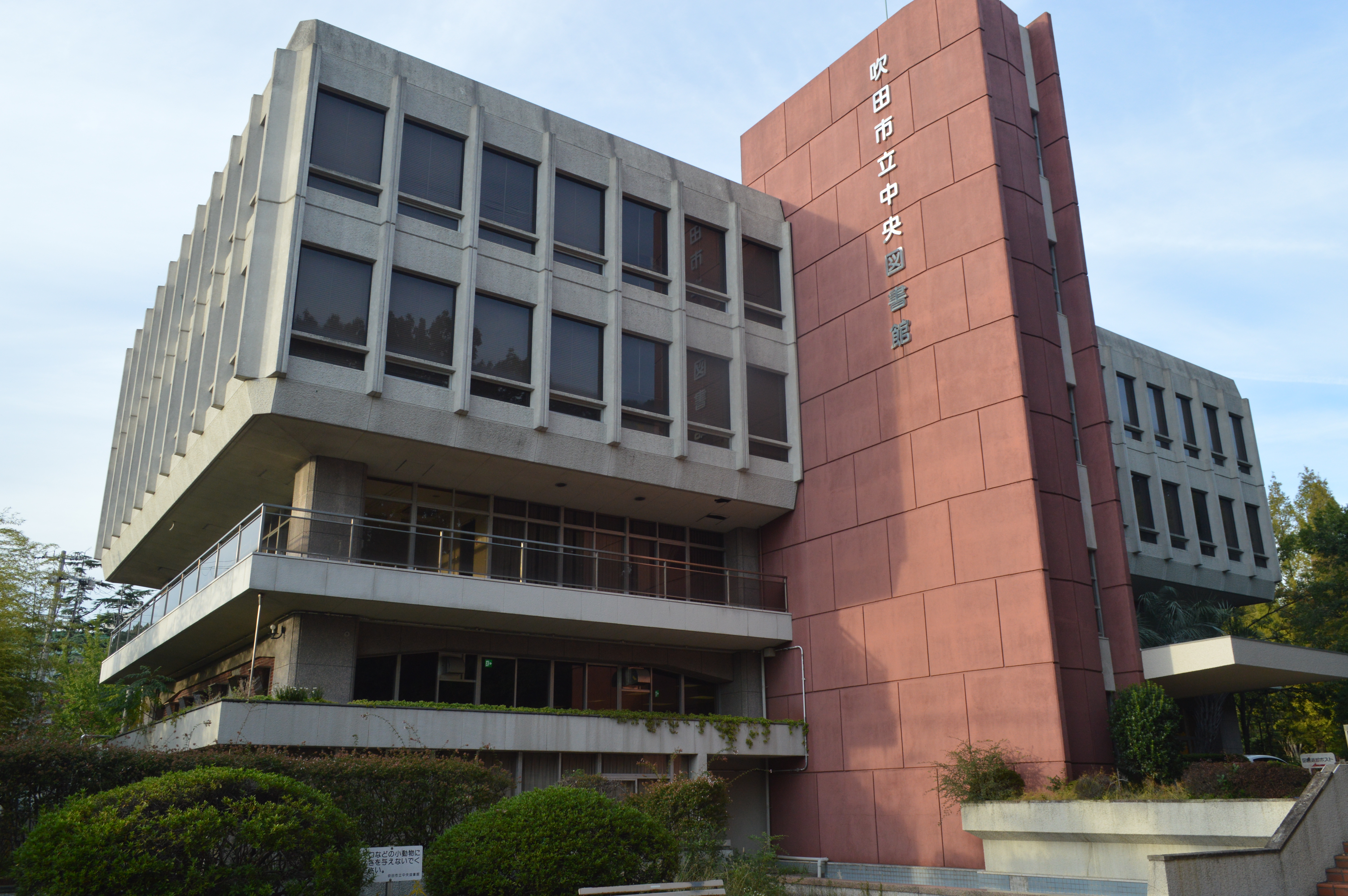 大阪府吹田市にある吹田市立中央図書館。